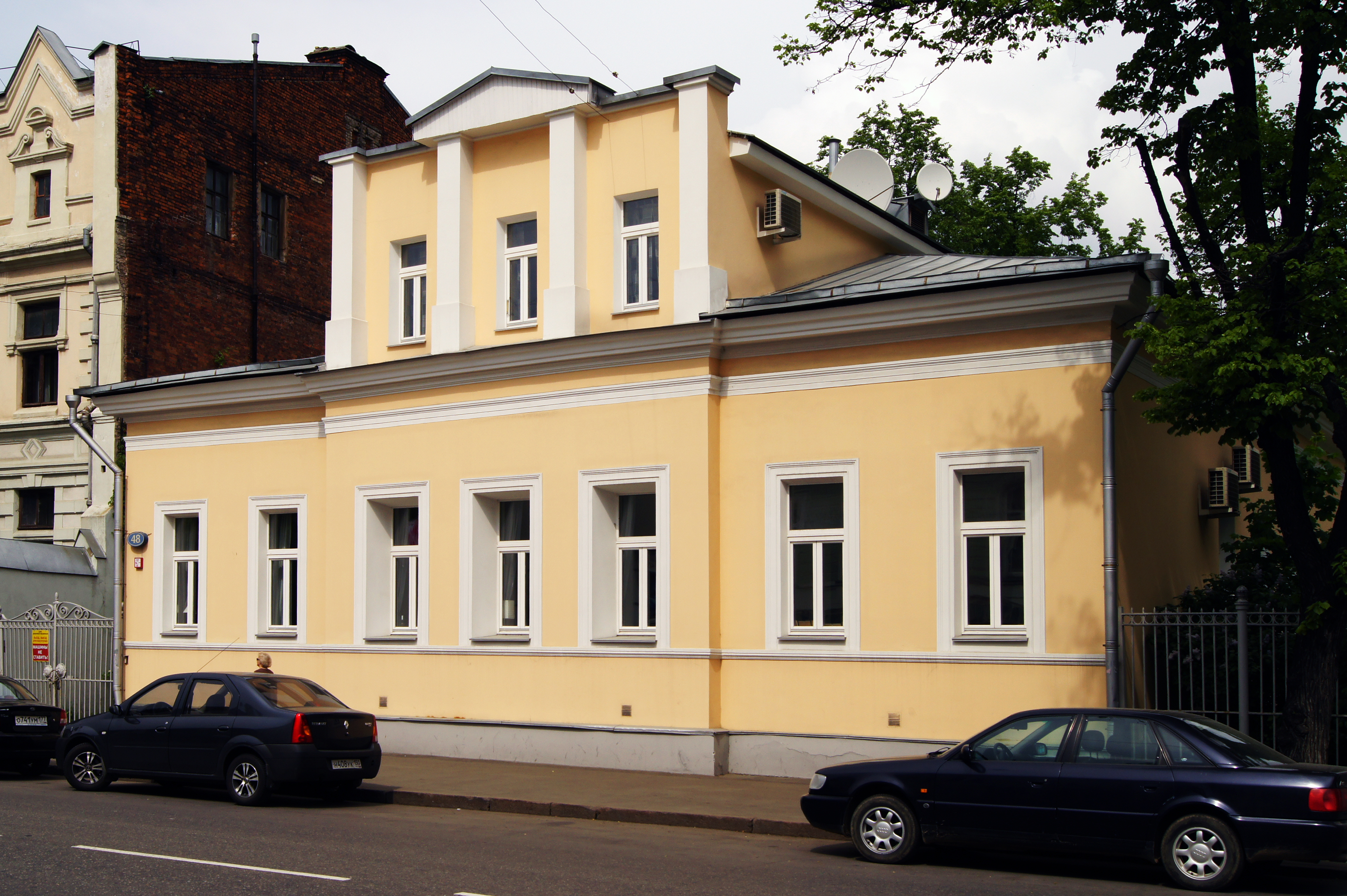 Поварская улица, дом 48